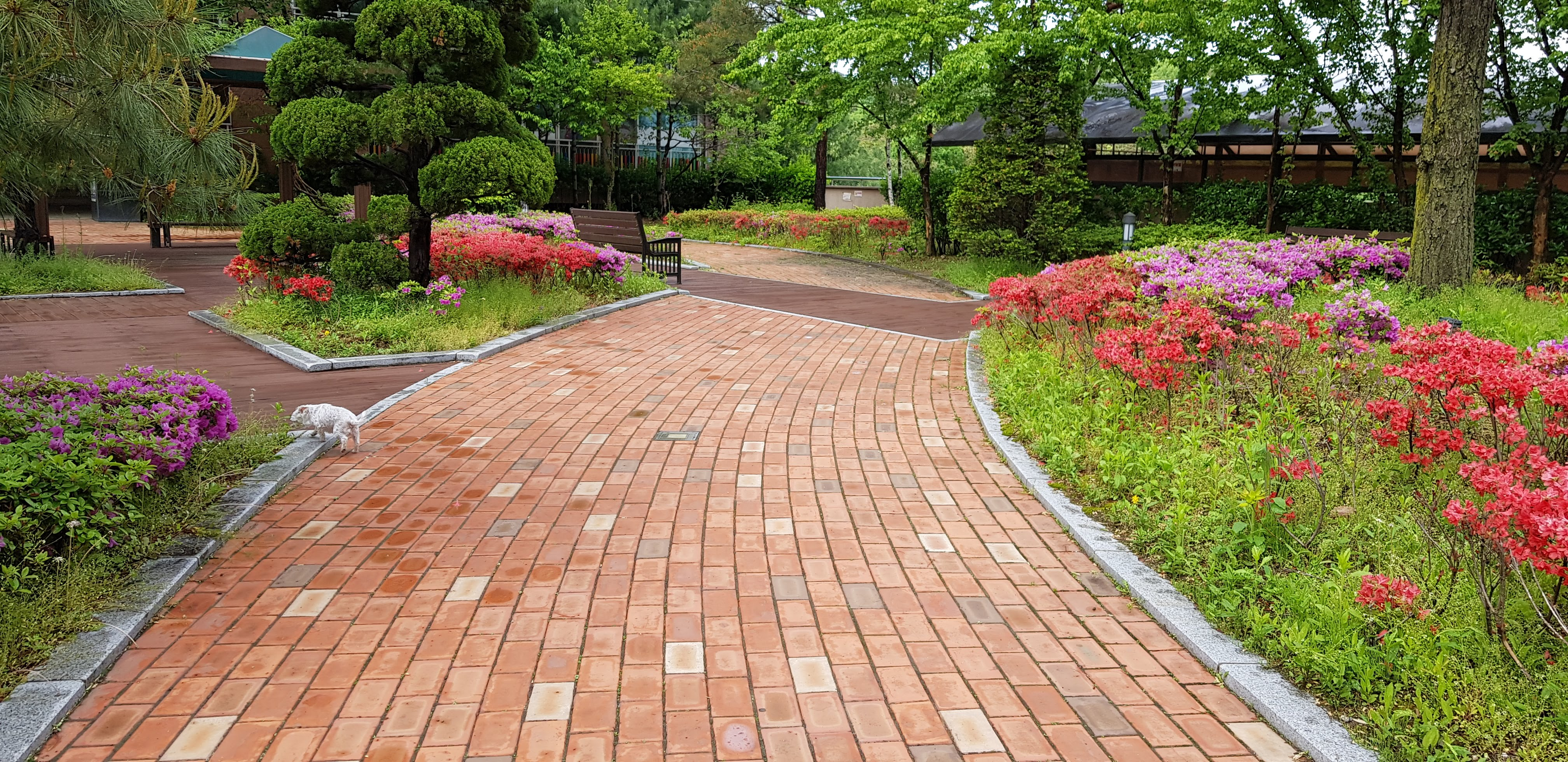 벽돌로 포장된 도보길